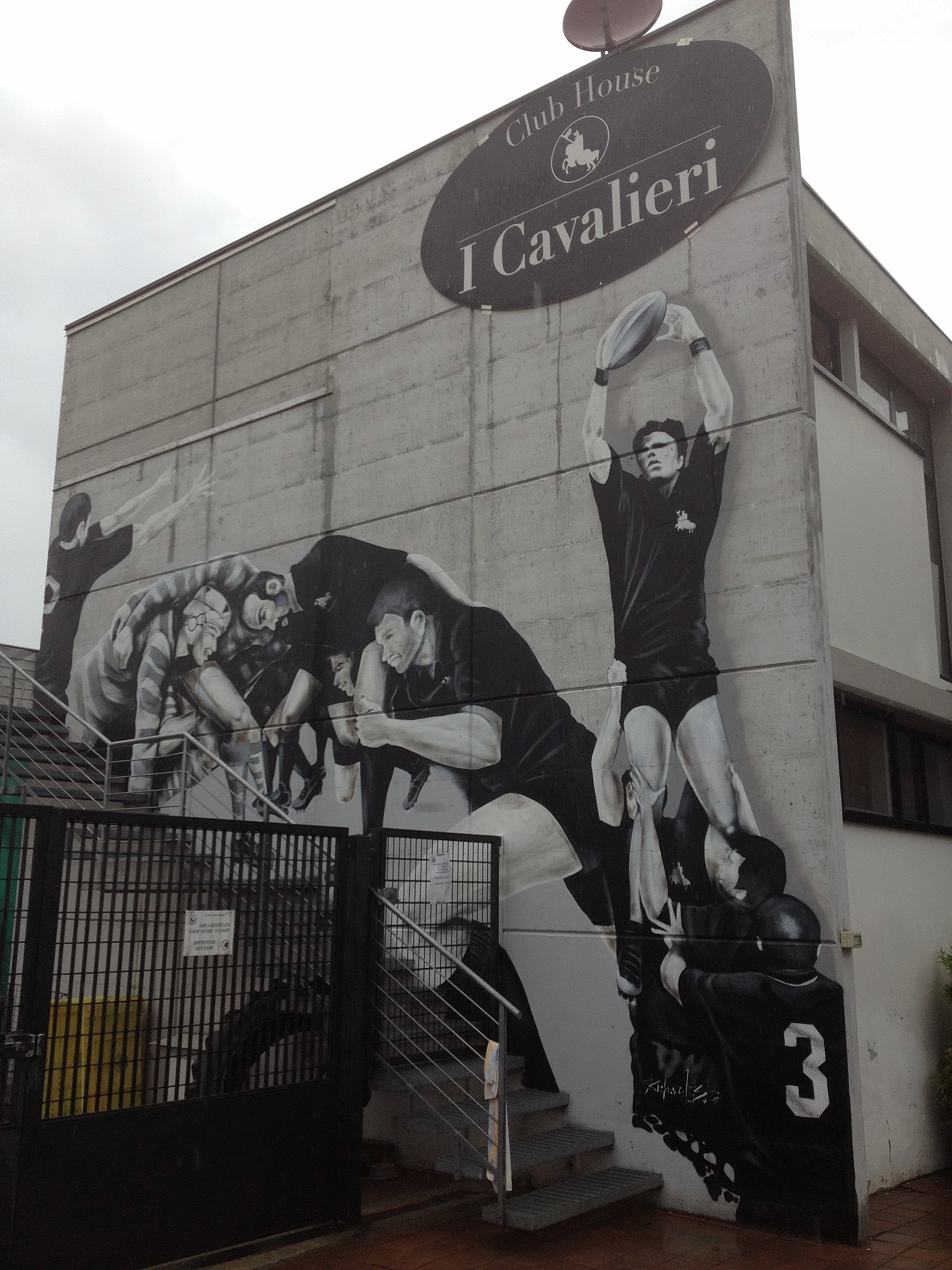 Prato, Cavalieri Rugby